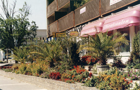 Mátészalkai városközpont